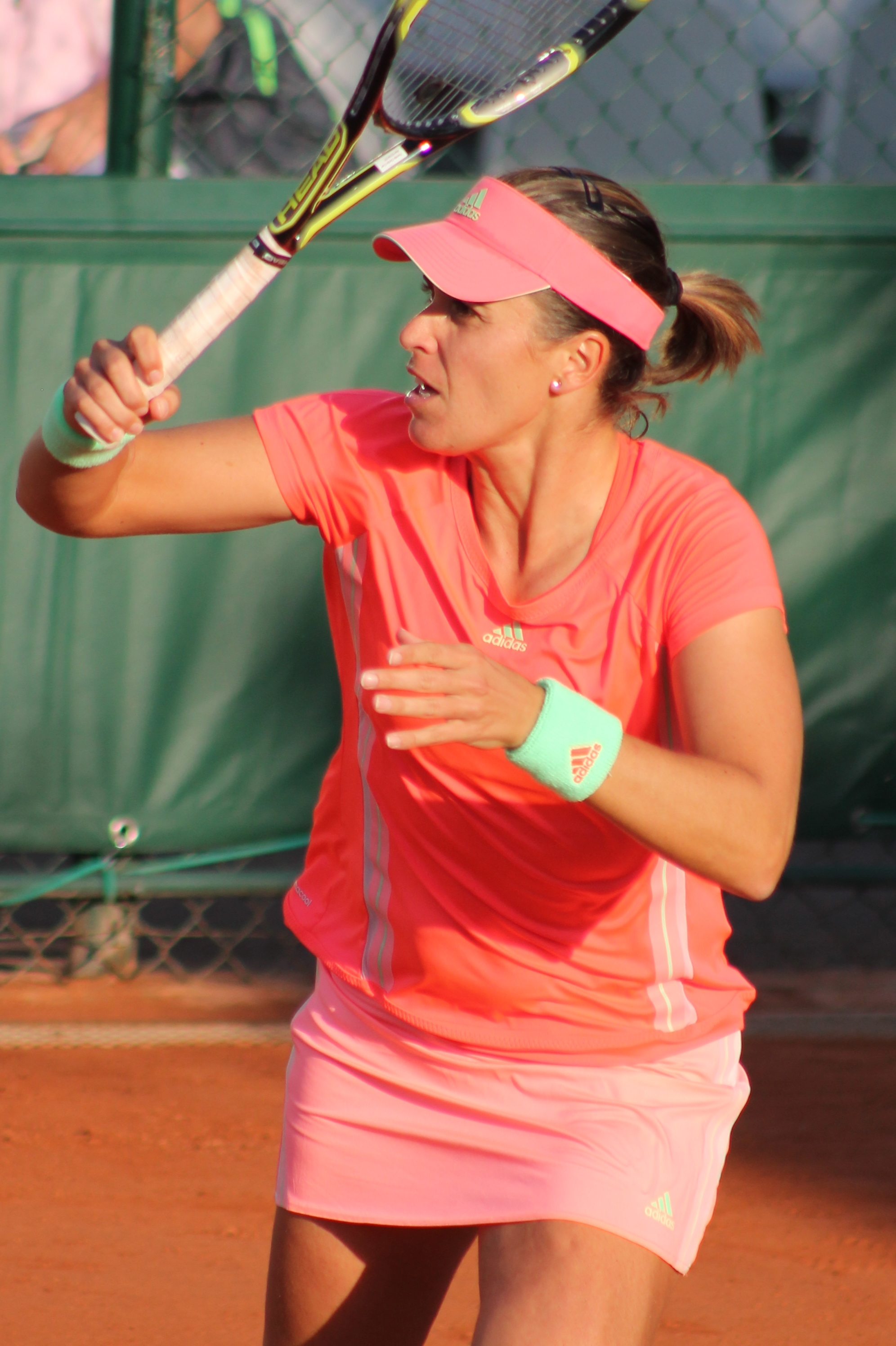 Medina Garrigues RG15 (1)